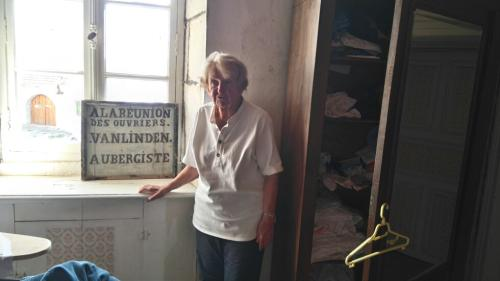 Parmi ses riches collections relatives à sa famille de Romain (Doubs) C Perrot avait conservé une enseigne du café tenu par son aieul dans cette localité.